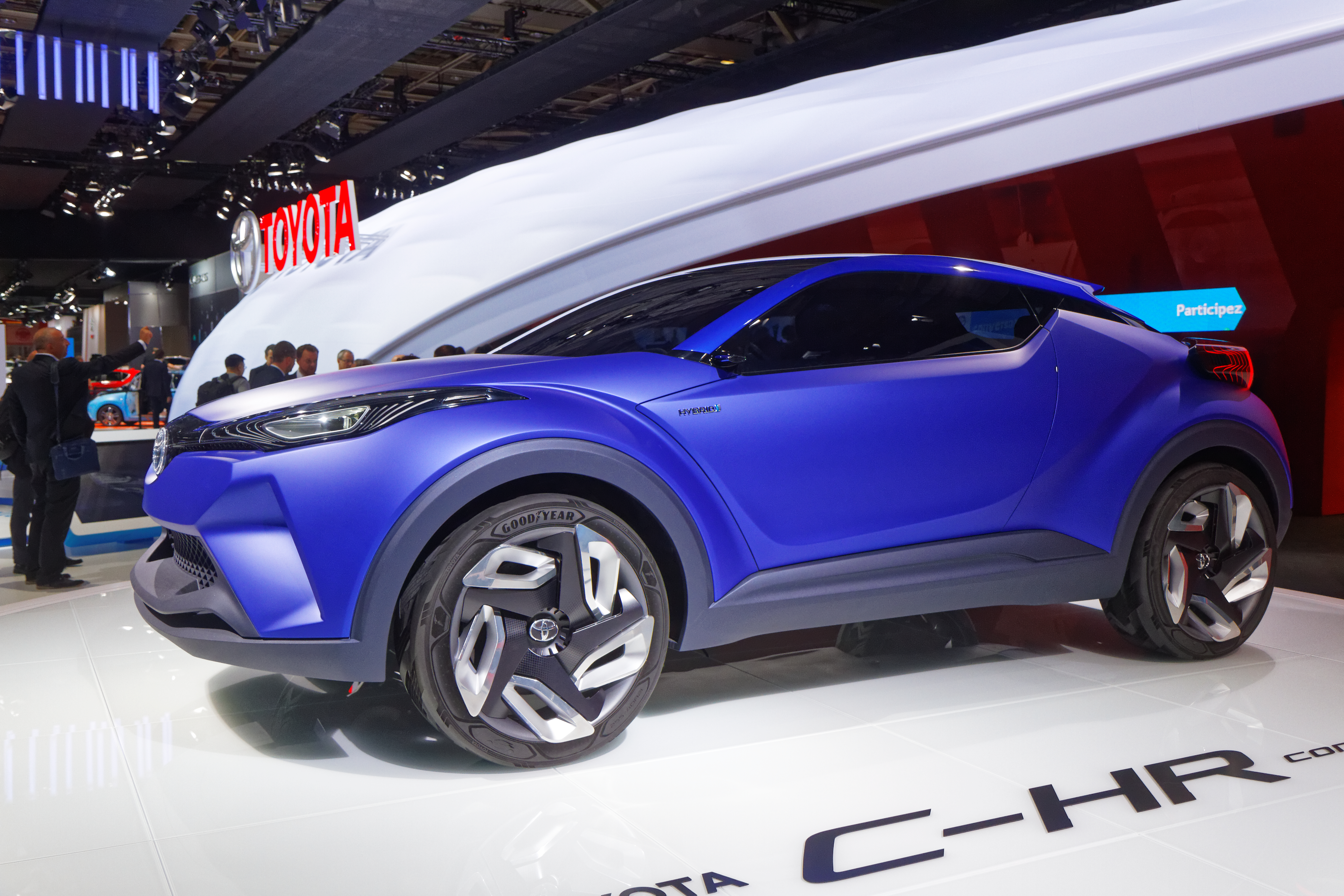 Une Toyota C-HR concept présentée lors du mondial de l'automobile de Paris 2014.